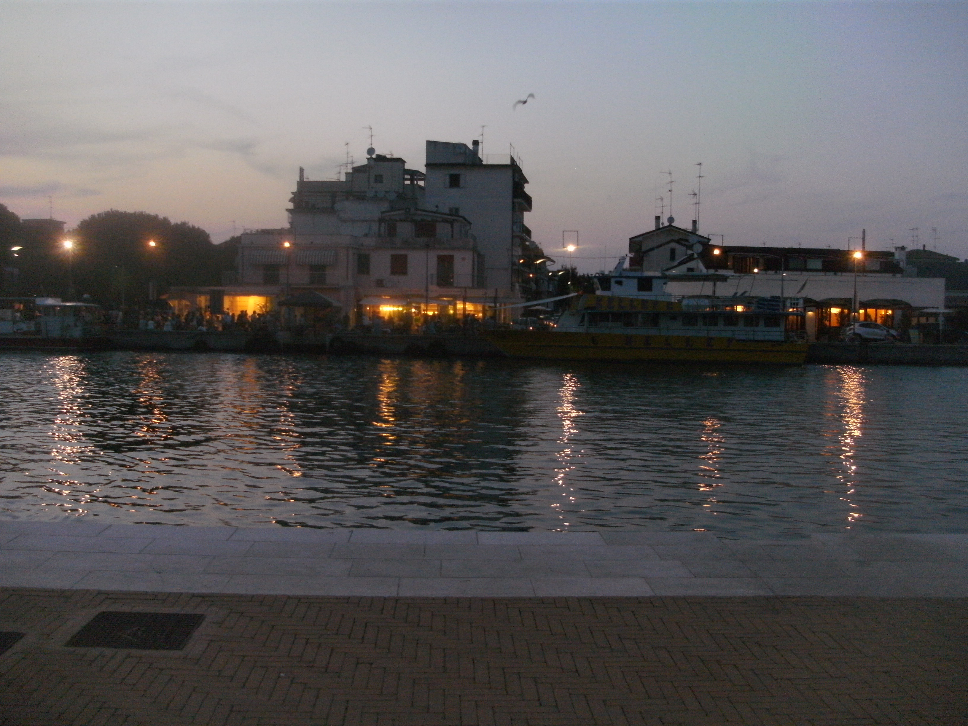 Porto Garibaldi (Comacchio, Fe), Italien, Promenade am Kanal Magnavacca in den Abendstunden, vom gegenüberliegenden Kanalufer bei Lido degli Estensi aus gesehen